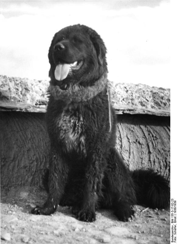 tibetischer Hund